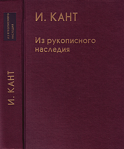 Обложка книги:Кант И. Из рукописного наследия (материалы к «Критике чистого разума», Opus Postumum). — М: Прогресс-Традиция, 2000. — 752 с. — ISBN 5-89826-066-8